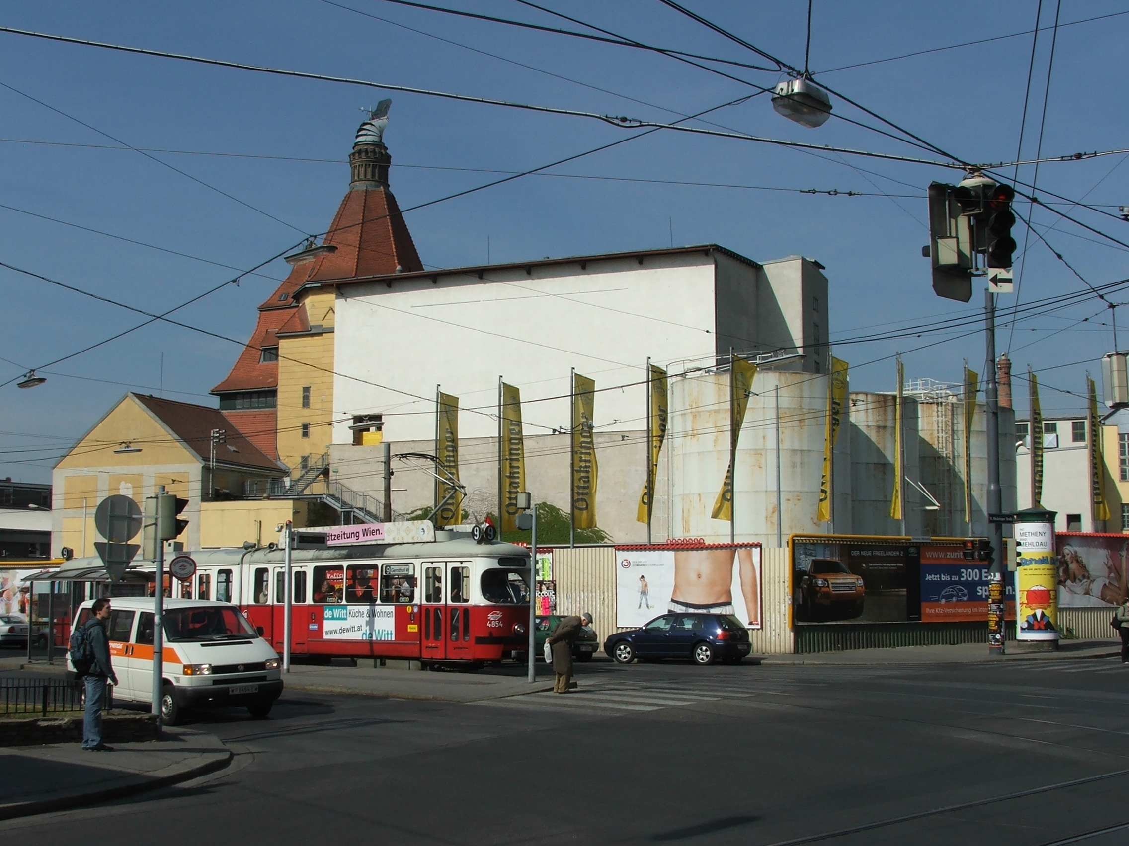 Ottakringer Brauerei